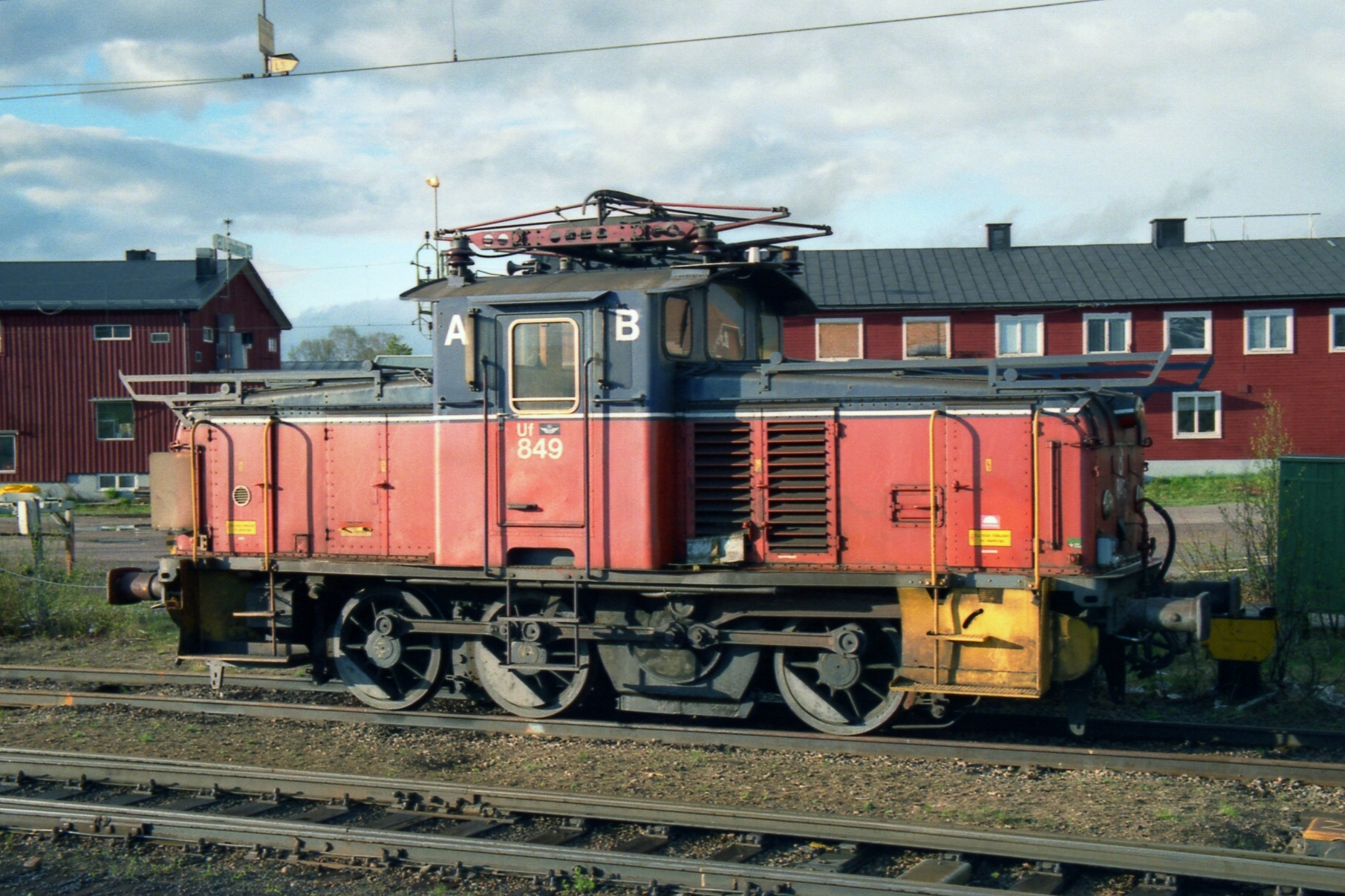 El-Lok Uf 849 Gällivare 28.05.00